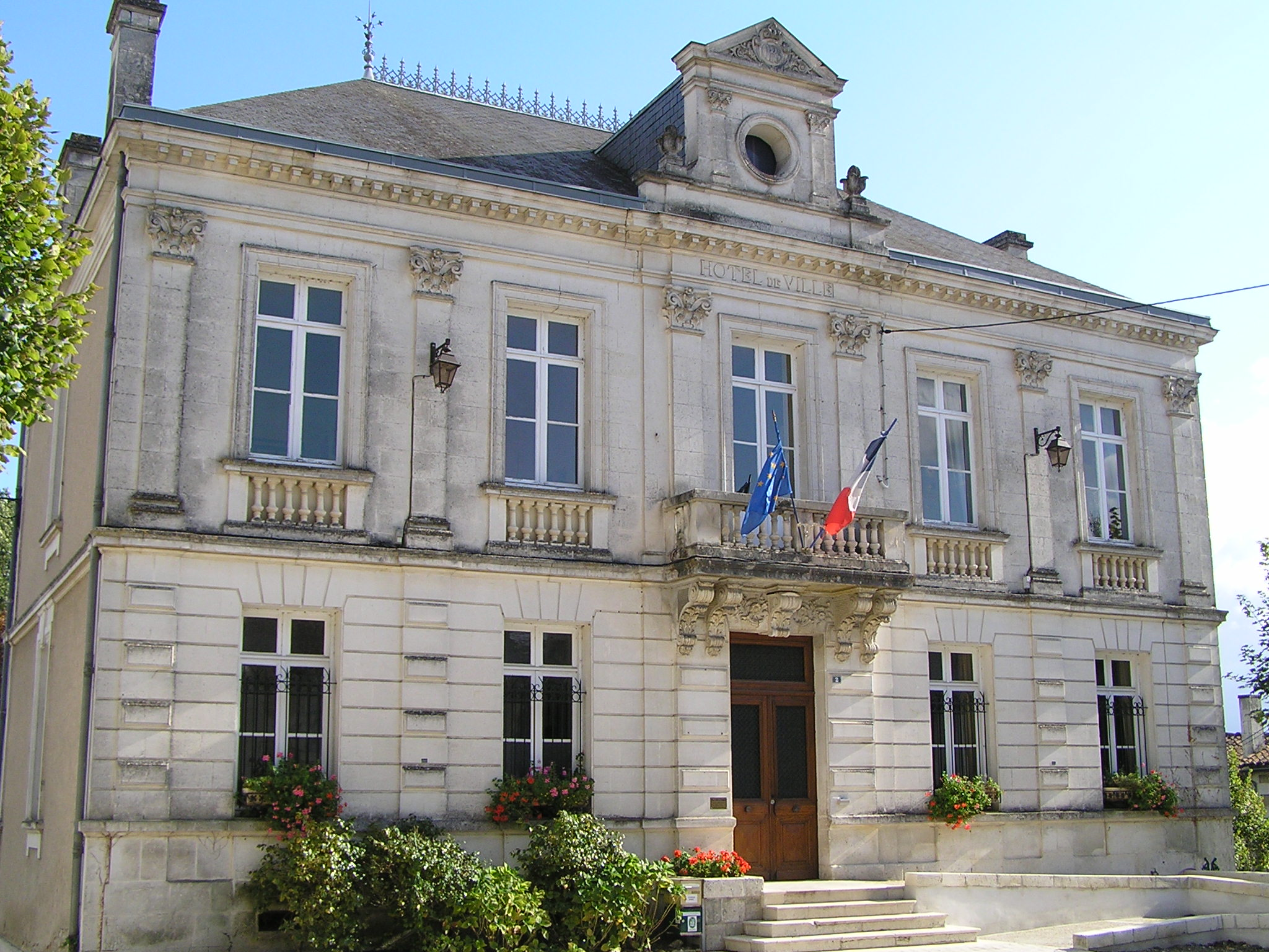 mairie de Blanzac-Porcheresse